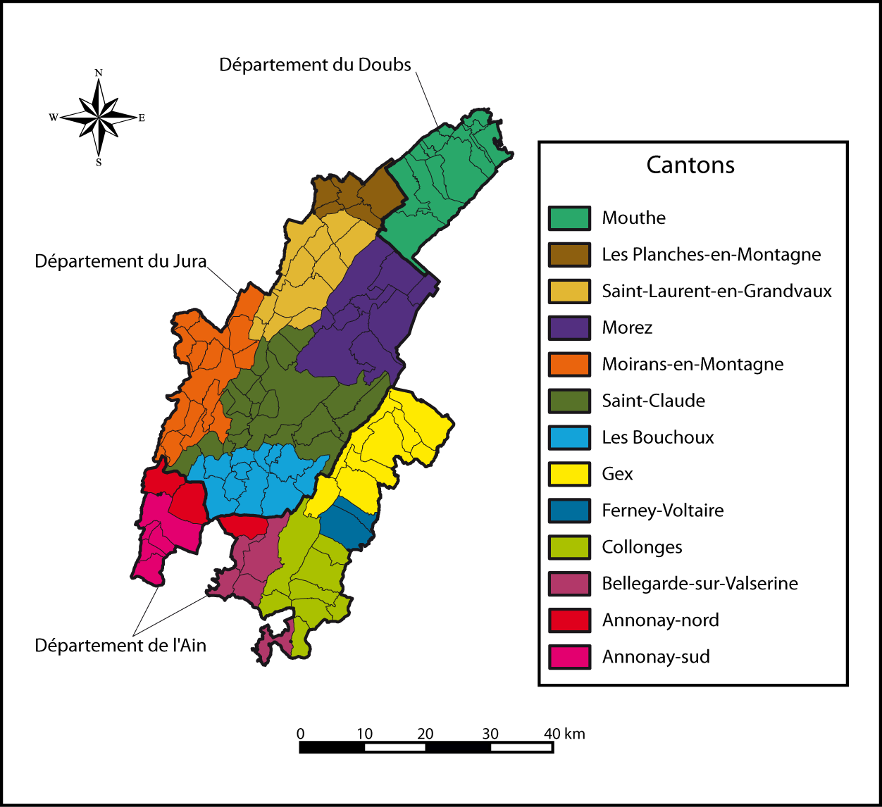 Cantons et communes appartenant au parc naturel du Haut-Jura